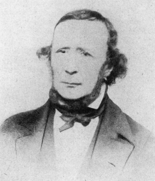 Thomas Turner (1799-1866), englischer Ingenieur, hatte 1840-42 die Aufsicht über den Betrieb der badischen Eisenbahnen